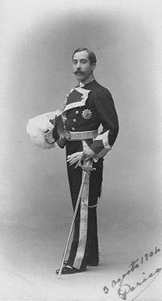 Foto familiar de D Pedro Cotoner y de Veri